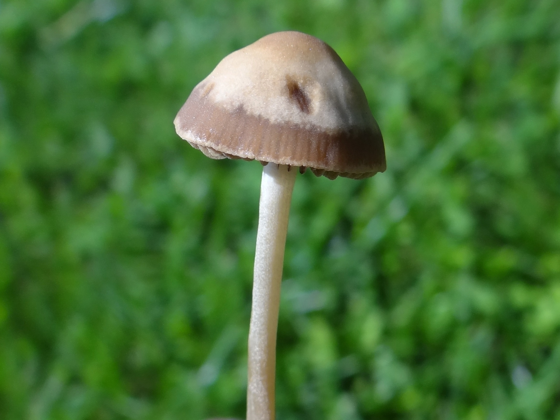 Panaeolina foenisecii